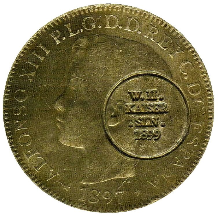 Isla Salomon moneda con resello conmemorativo de la ocupación alemana